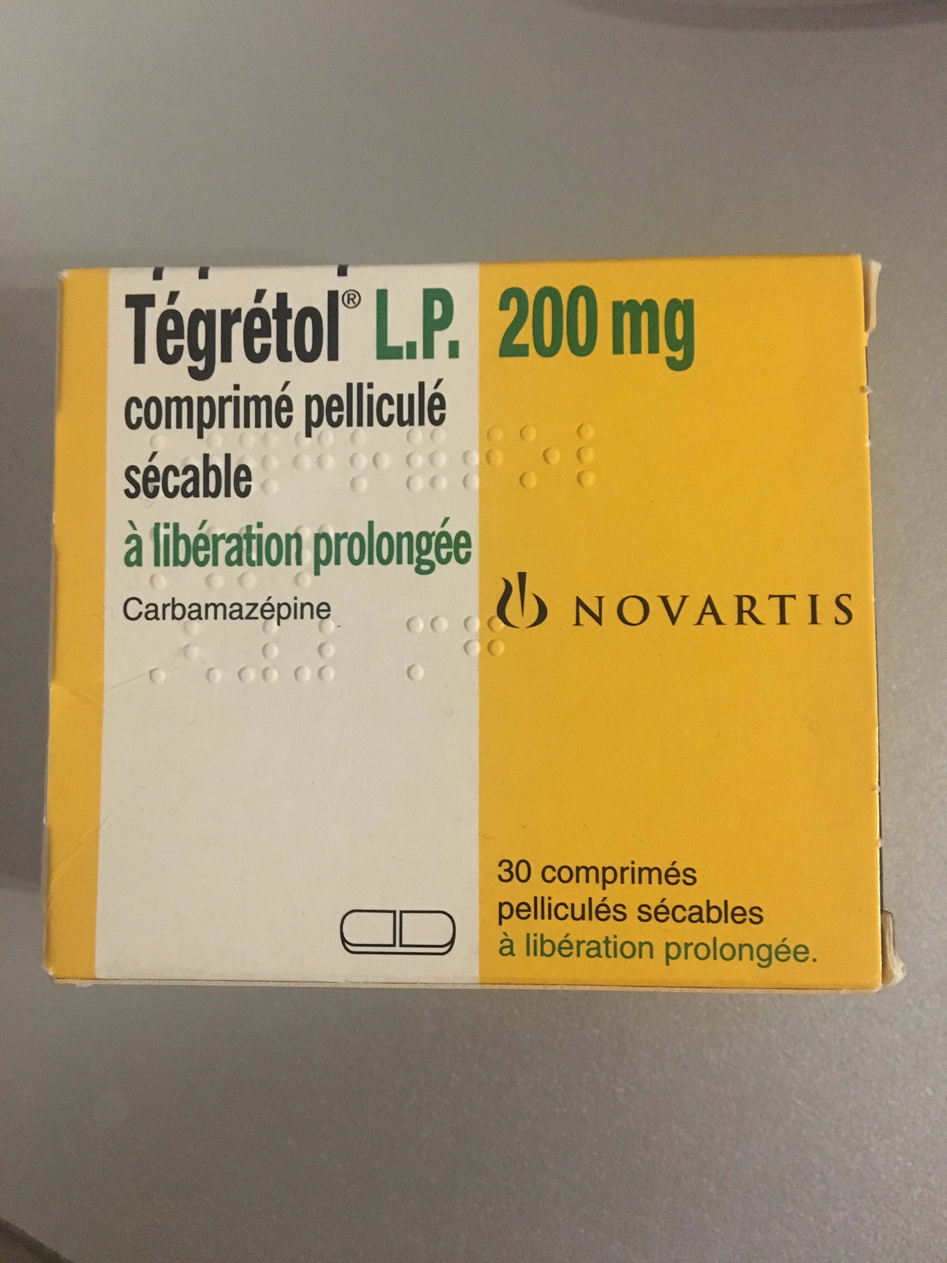 Boîte de Tégrétol L.P 200 mg en France